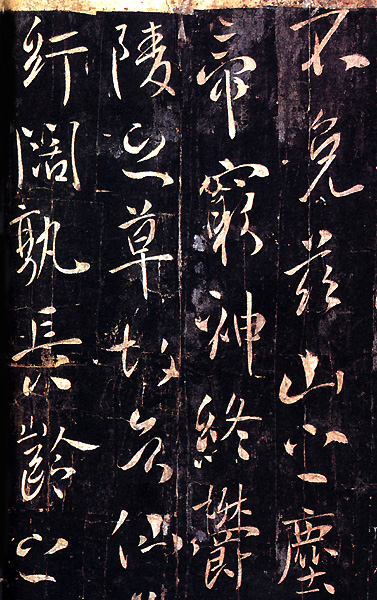 [唐]李世民 《温泉铭》（局部） 原石早佚，唐拓孤本现藏法国巴黎图书馆 来自